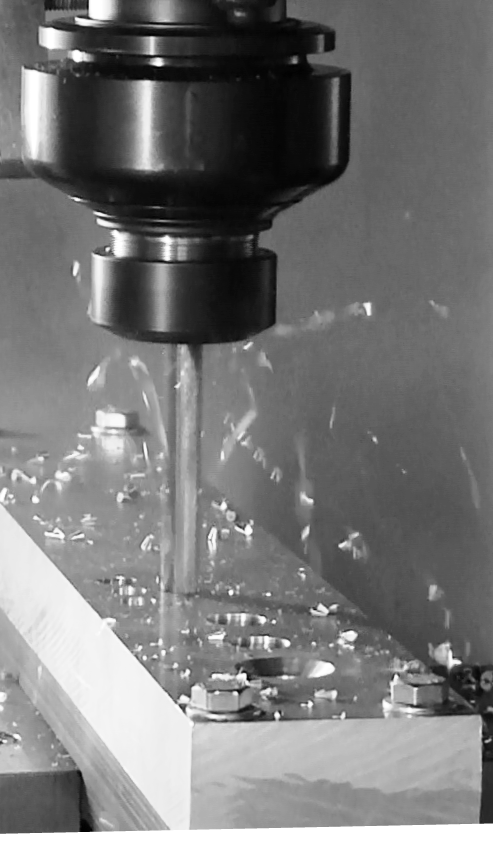 perçage vibratoire multi-matériaux titane-carbone (application aéronautique)